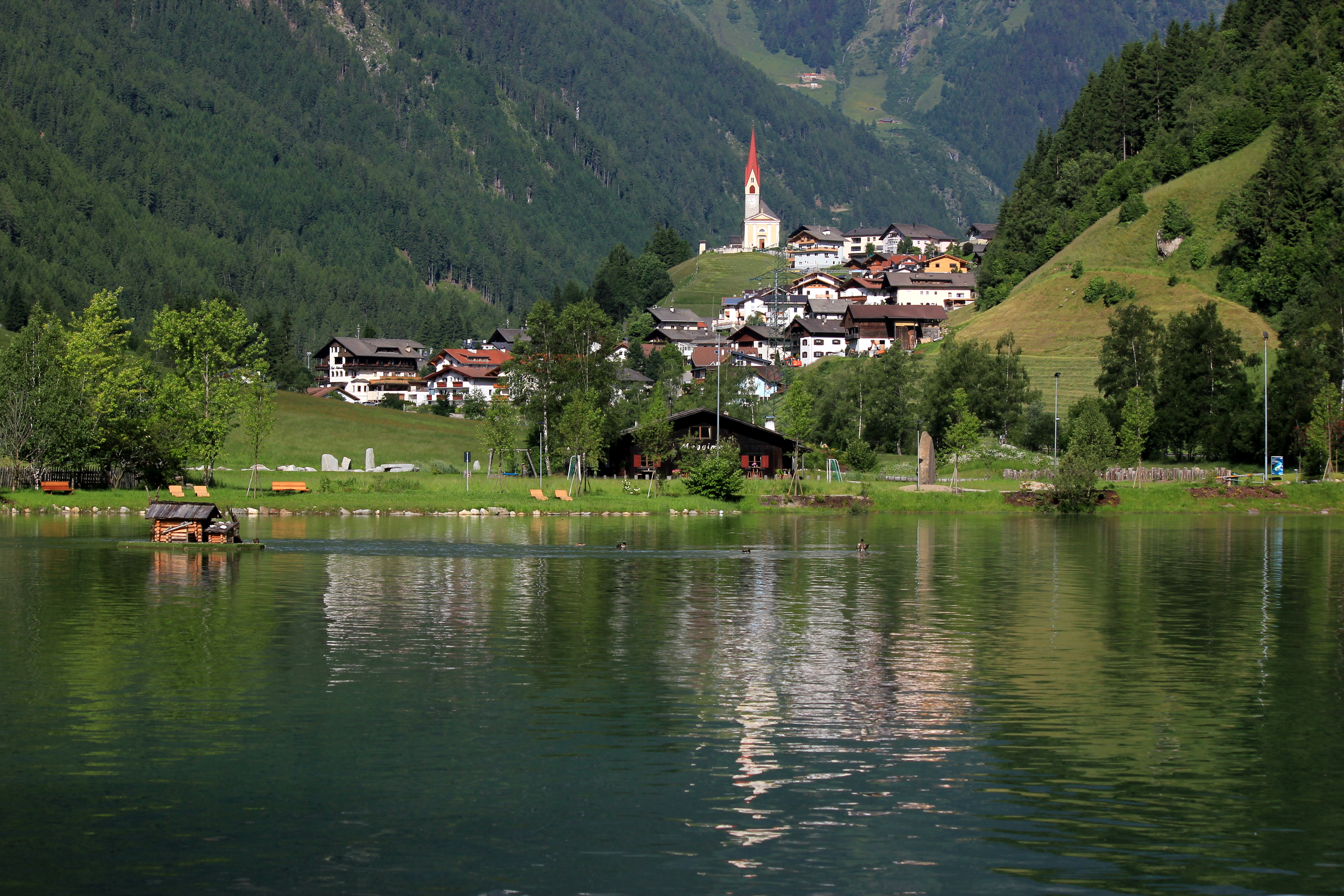 Hornjoserbsce: Napohlad wjeski Mühlwald w Južnym Tirolu z wuchoda.